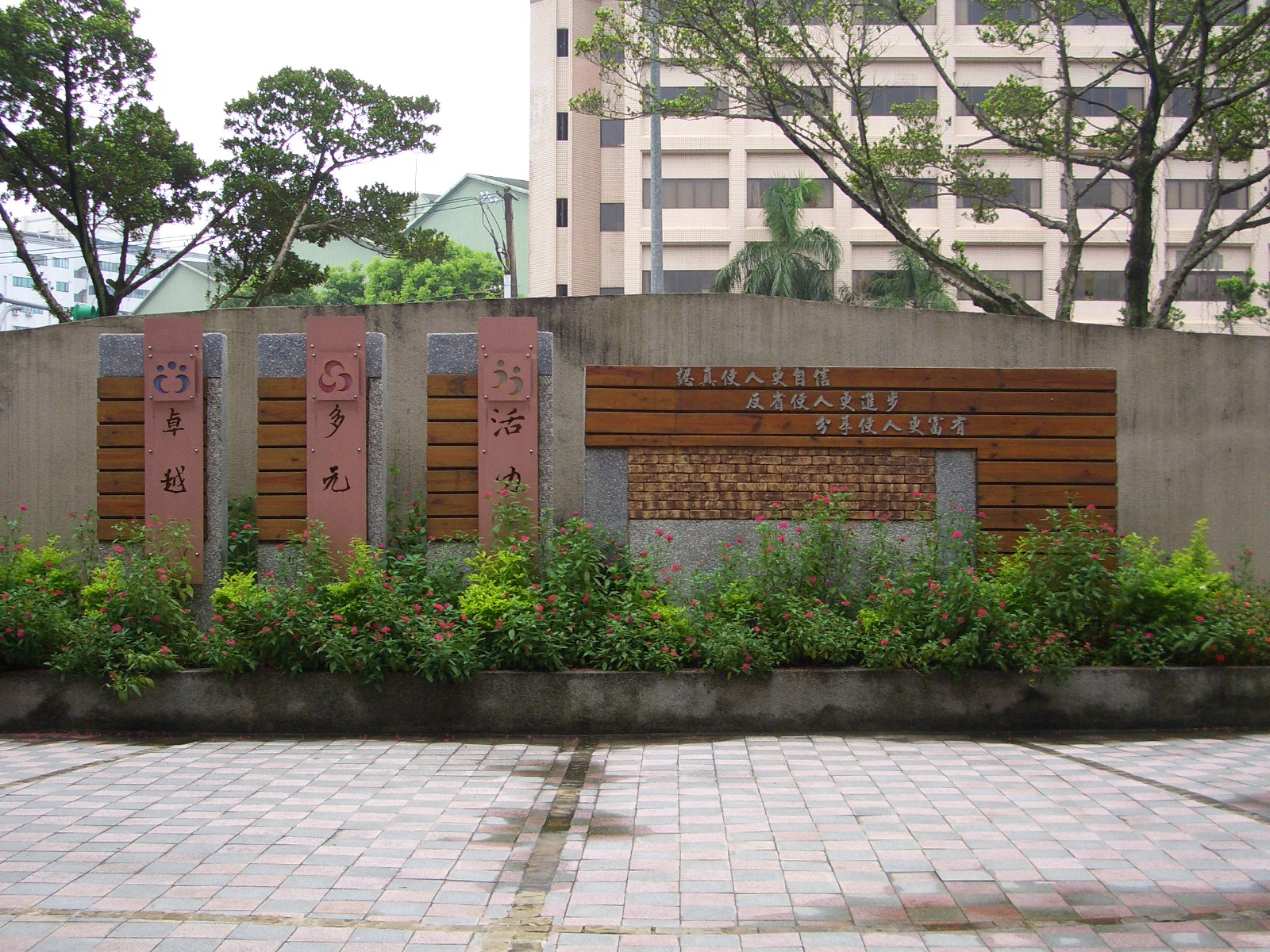 臺北市立南港高級中學校門口(內)